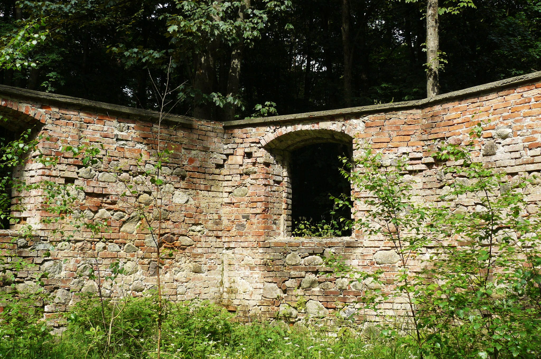 Osada Ostrowite w Drawieńskim PN.